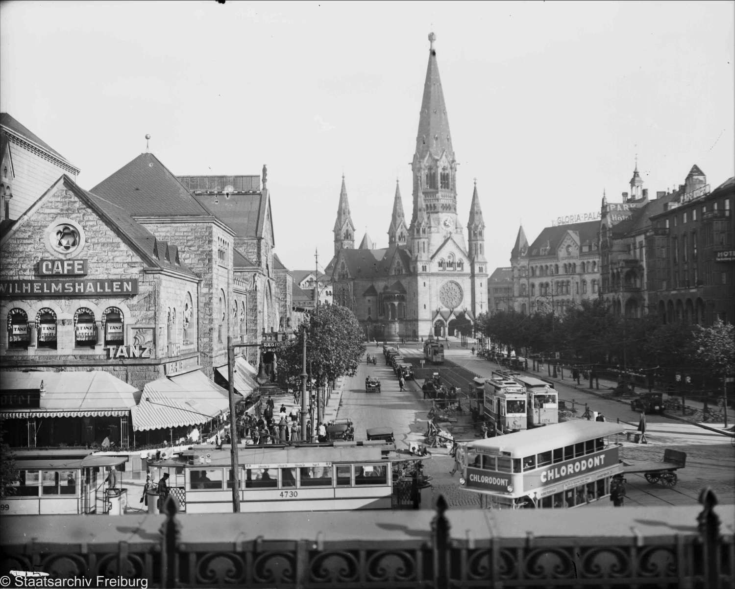 Blick von der Hardenbergstraße auf die Ausstellungshallen am Zoo, die Kaiser-Wilhelm-Gedächtniskirche und das Erste Romanische Haus mit dem Gloria-Palast in Berlin-Charlottenburg.